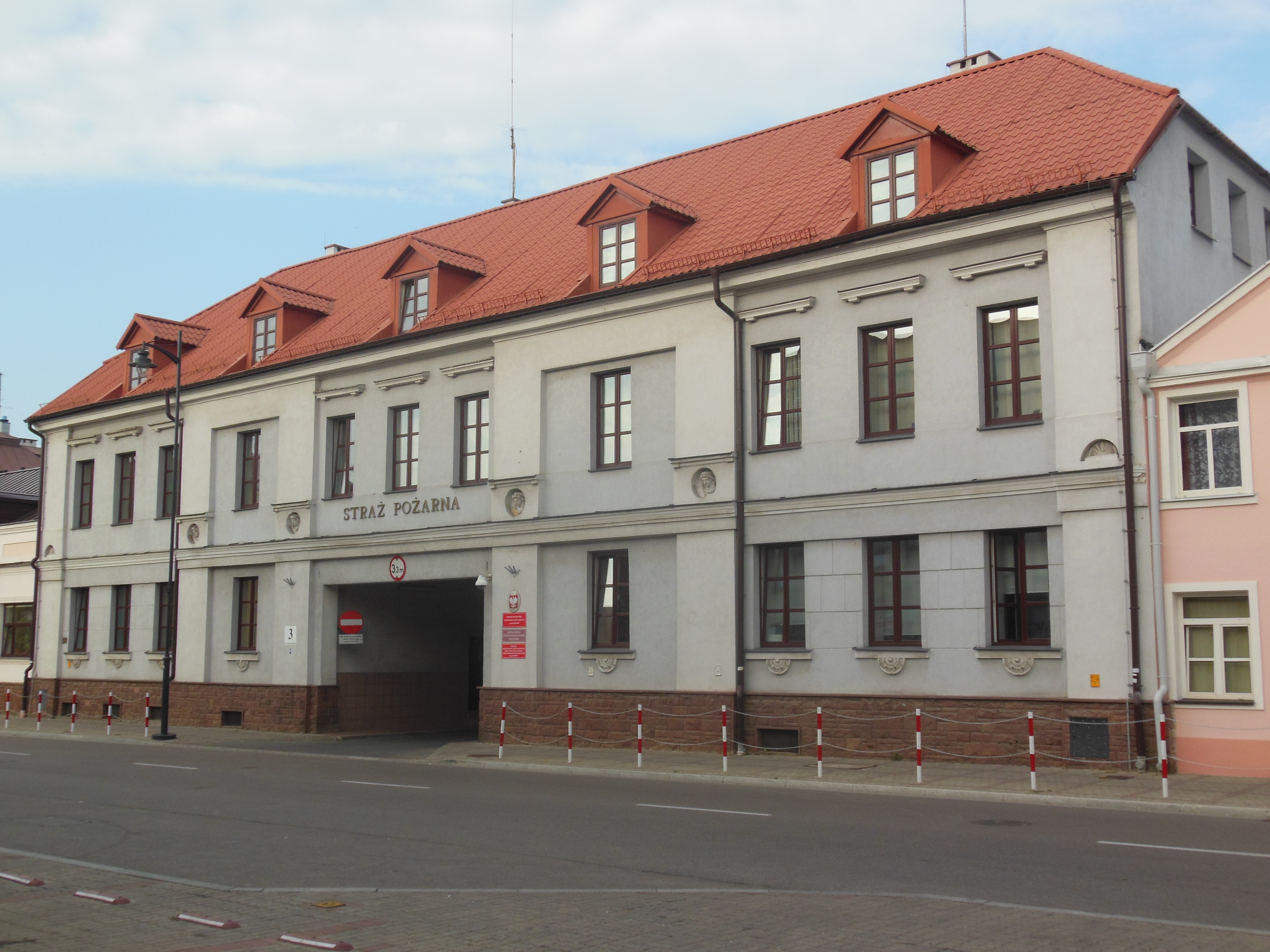 Białystok, dom, kon. XIX